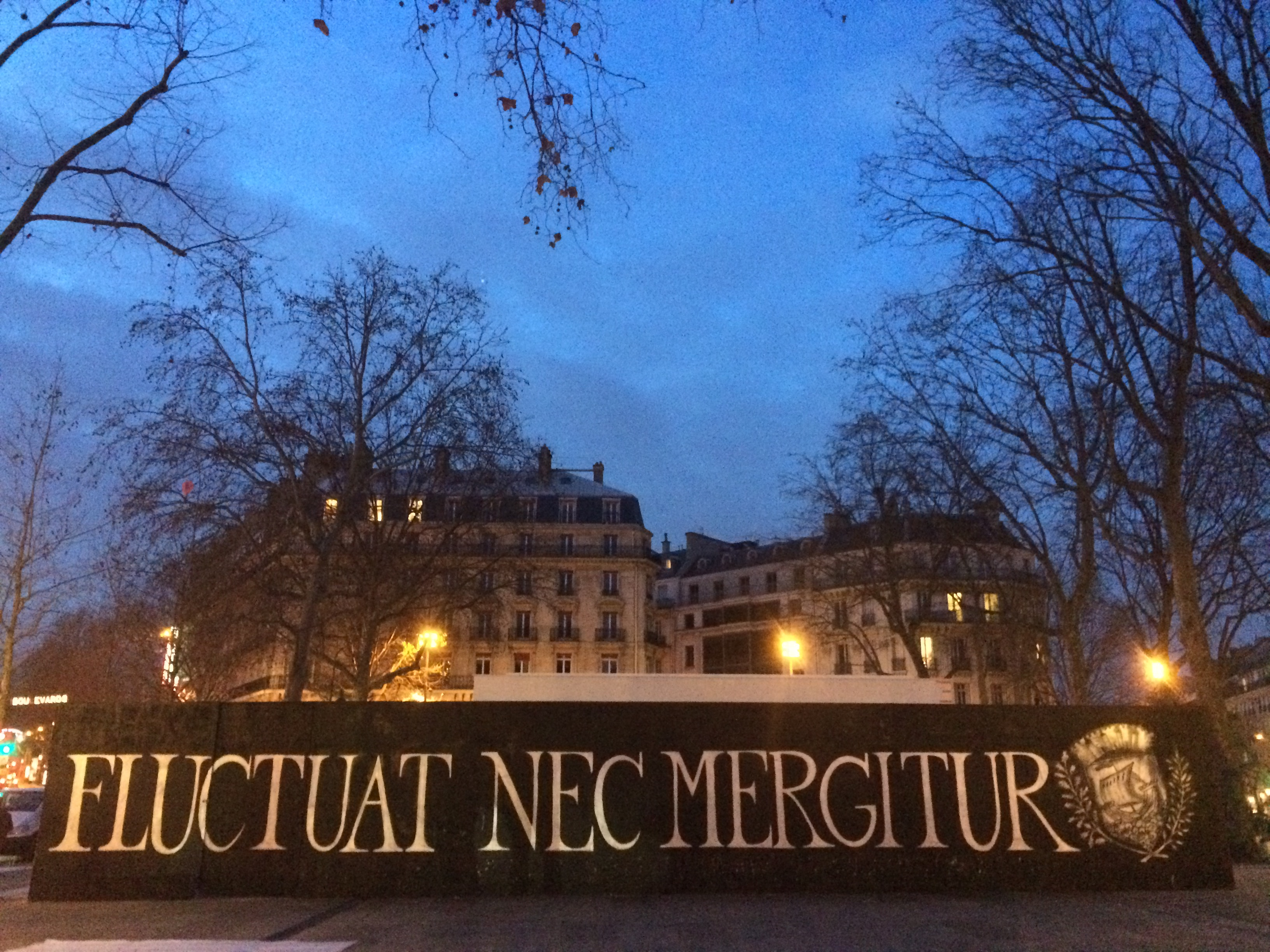 Inscription "Fluctuat nec mergitur" sur un mur situé place de la République à Paris.